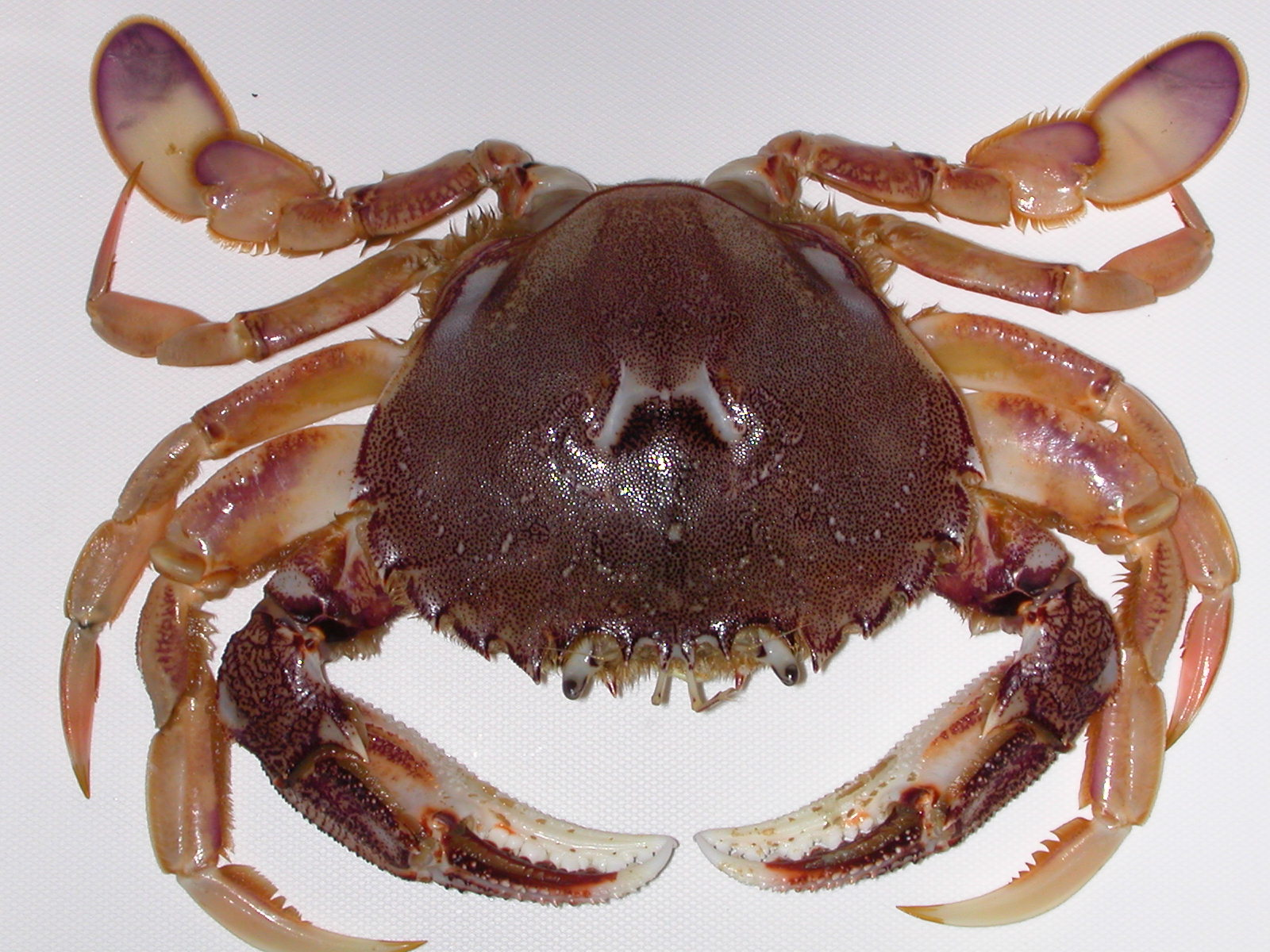 Ovalipes punctatus (ヒラツメガニ)